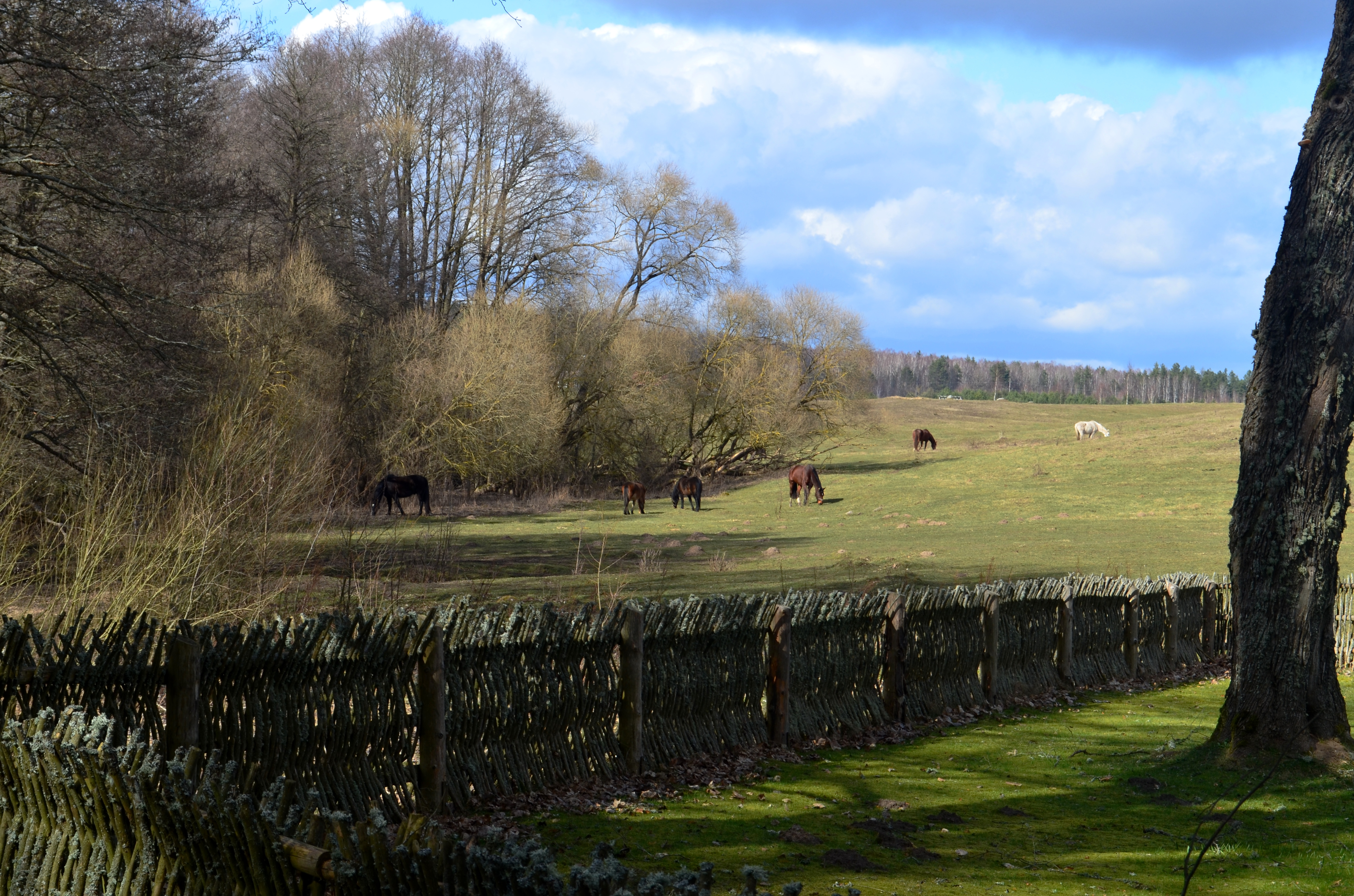 Arklio muziejaus žirgai, Niūronys, Anykščių raj.